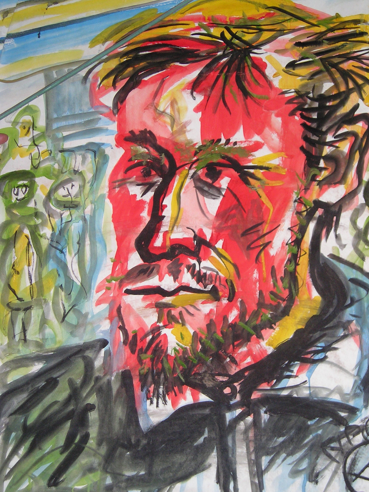 Dieses Selbstportrait stammt noch aus der Zeit vor Valeri Giurskis Ausreise in den Westen. Es zeigt einen skeptisch bis depressiven Künstler im Umfeld der ukrainischen Gesellschaft. Die Ukraine wird in den ukrainischen Nationalfarben Blau-Gelb dargestellt. Die im Hintergrund dargestellten Personen schauen auf den Künstler als Hoffnungsträger für Grundrechte. So jedenfalls sah sich auch Valeri Gourski. Die gesellschaftlichen Zustände treiben dem Künstler die Zornesröte ins Gesicht, oder/und: der Künstler ist durchaus proletarischer Herkunft und arbeitet für das Volk. In jedem Falle zeigt dieses Selbstportrait die schwierige Beziehung zwischen Gesellschaft und Kunst/Künstler auf, wie sie Valeri Gourski im sowjetisch-ukrainischen Staat erlebt hatte.